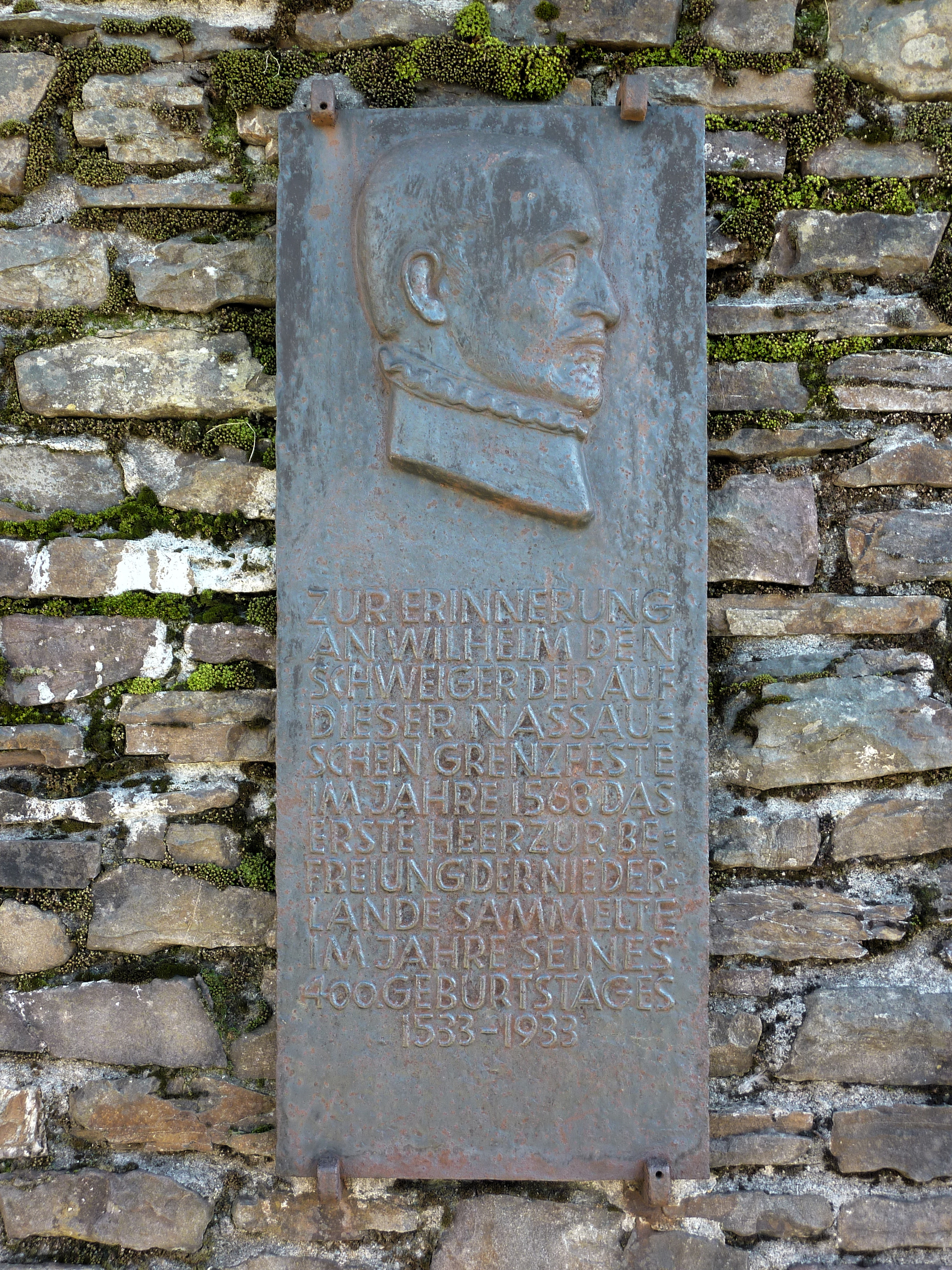 Gemeinde Grund (Hilchenbach)/Westfalen: Die Ginsburg-Ruine, vom 13. bis 17. Jahrhundert Grenzfestung des Hauses Nassau auf dem Schlossberg. Gedenktafel anläßlich der 400. Wiederkehr des Geburtstages von Wilhelm I. von Oranien-Nassau im Jahr 1933.